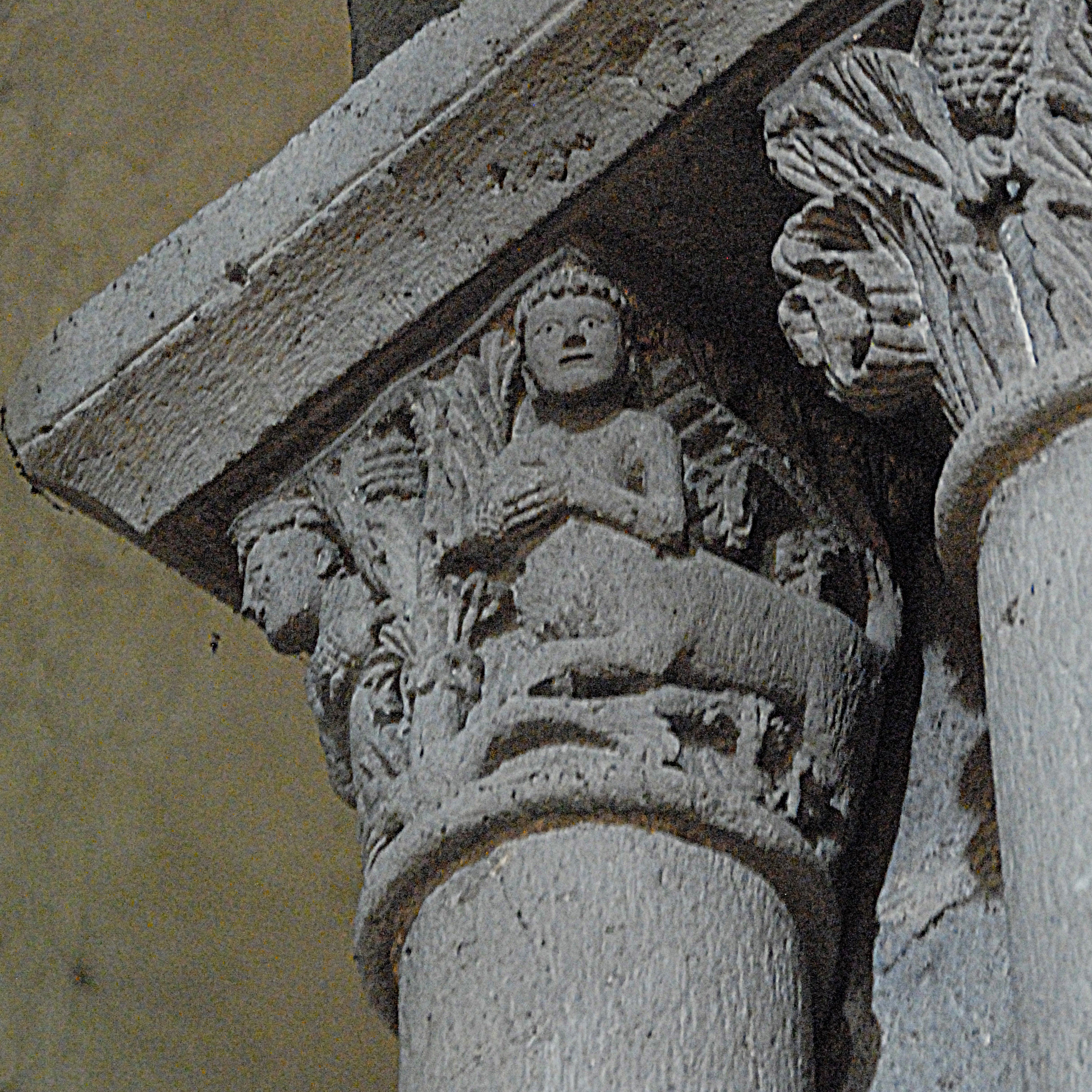 N.-Dame d'Orcival, Umgangskapitell Kentaur